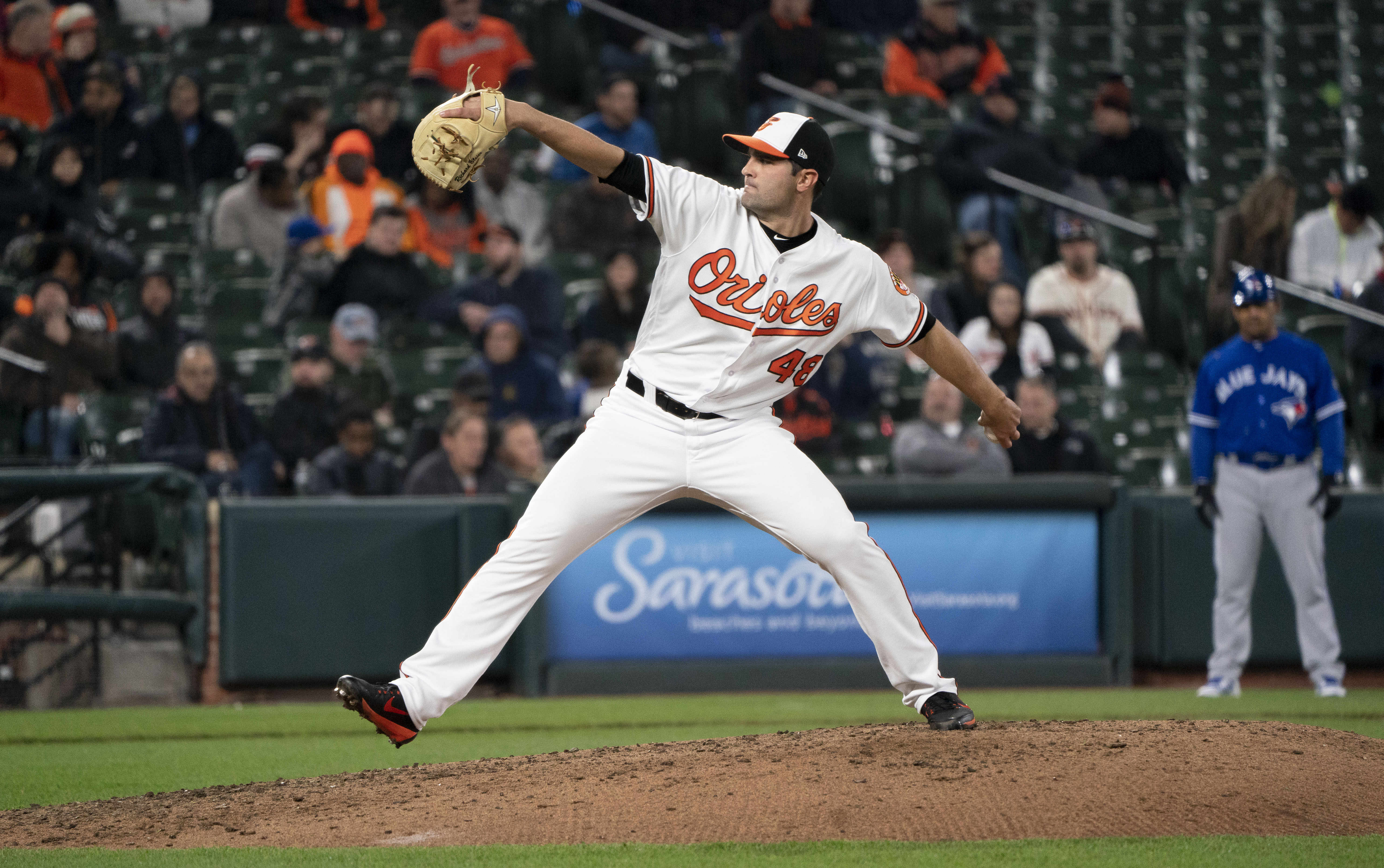 Blue Jays at Orioles 4/11/18